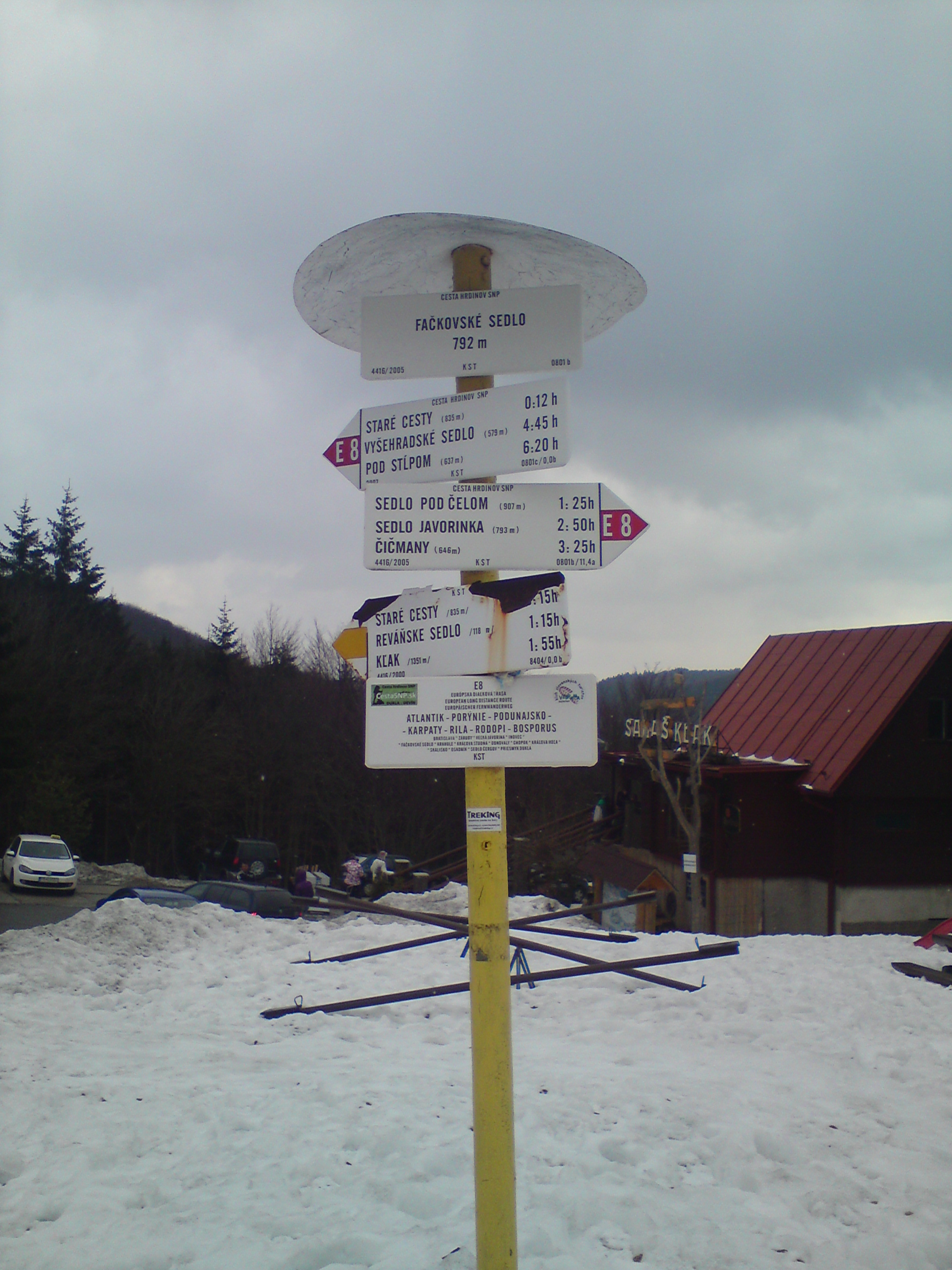 Krizovatka turistickych chodnikov vo Fackovskom sedle